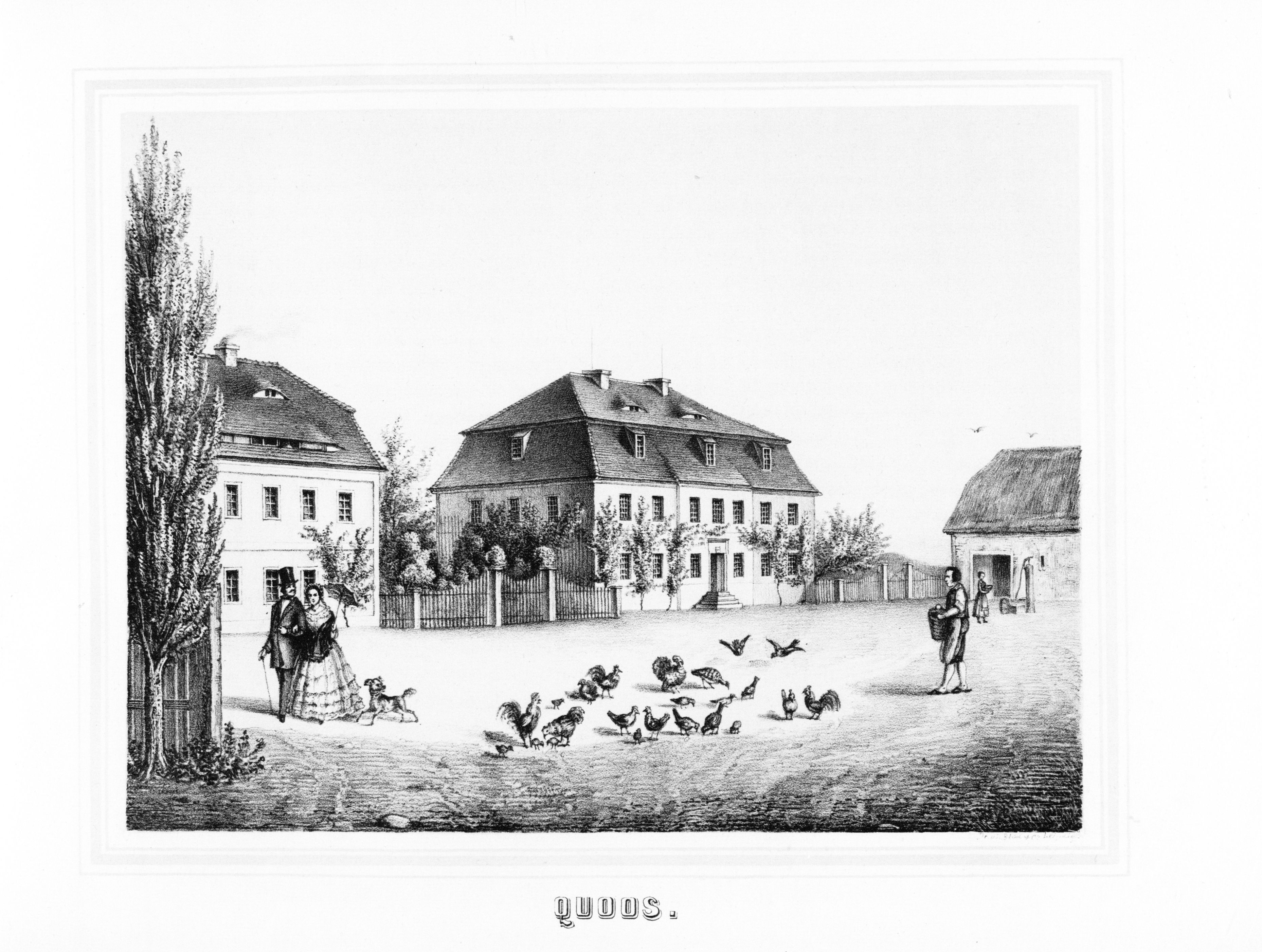 Quoos aus: Album der Rittergüter und Schlösser im Königreiche Sachsen Markgrafenthum Oberlausitz Section: III